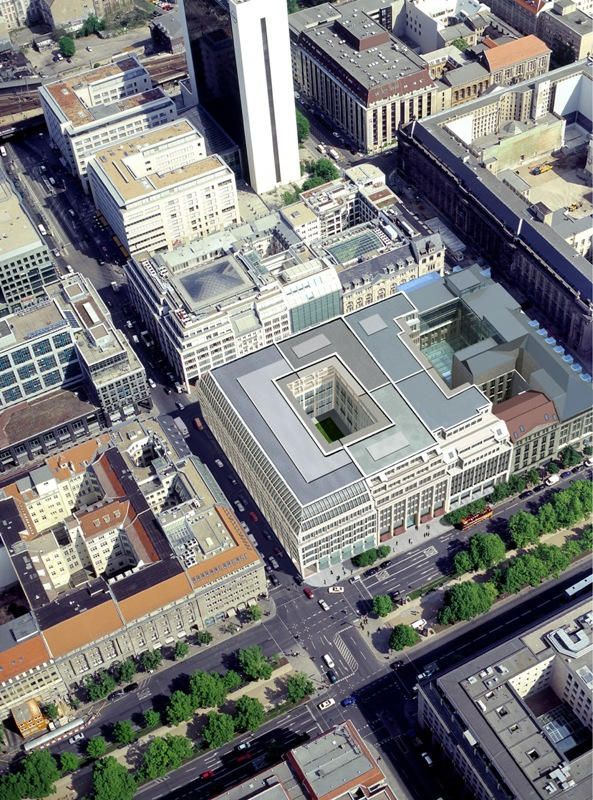 Luftperspektive